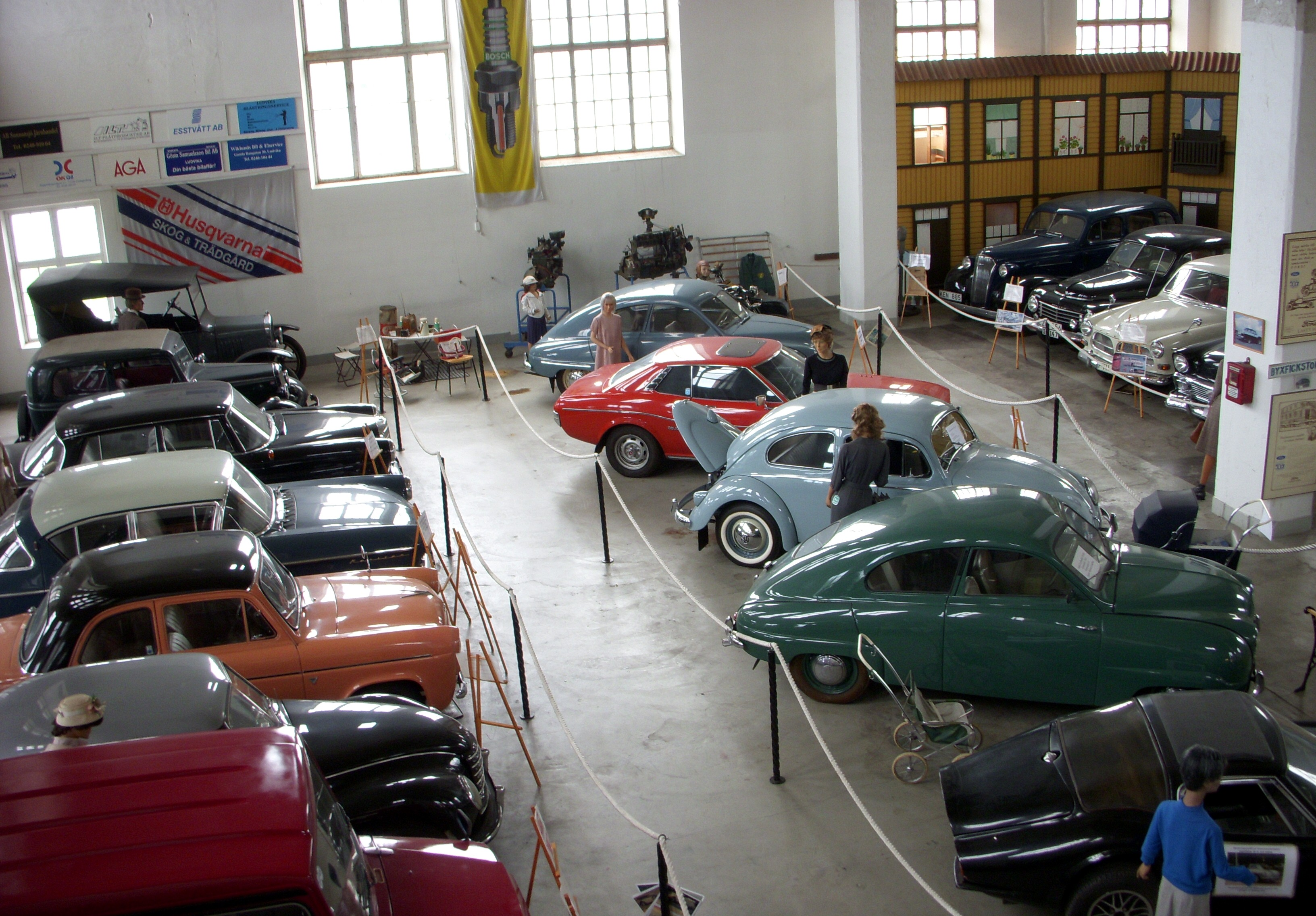 Motor & nostalgimuseet i Grängesberg, Ludvika kommun (utställningshallen för bilar)